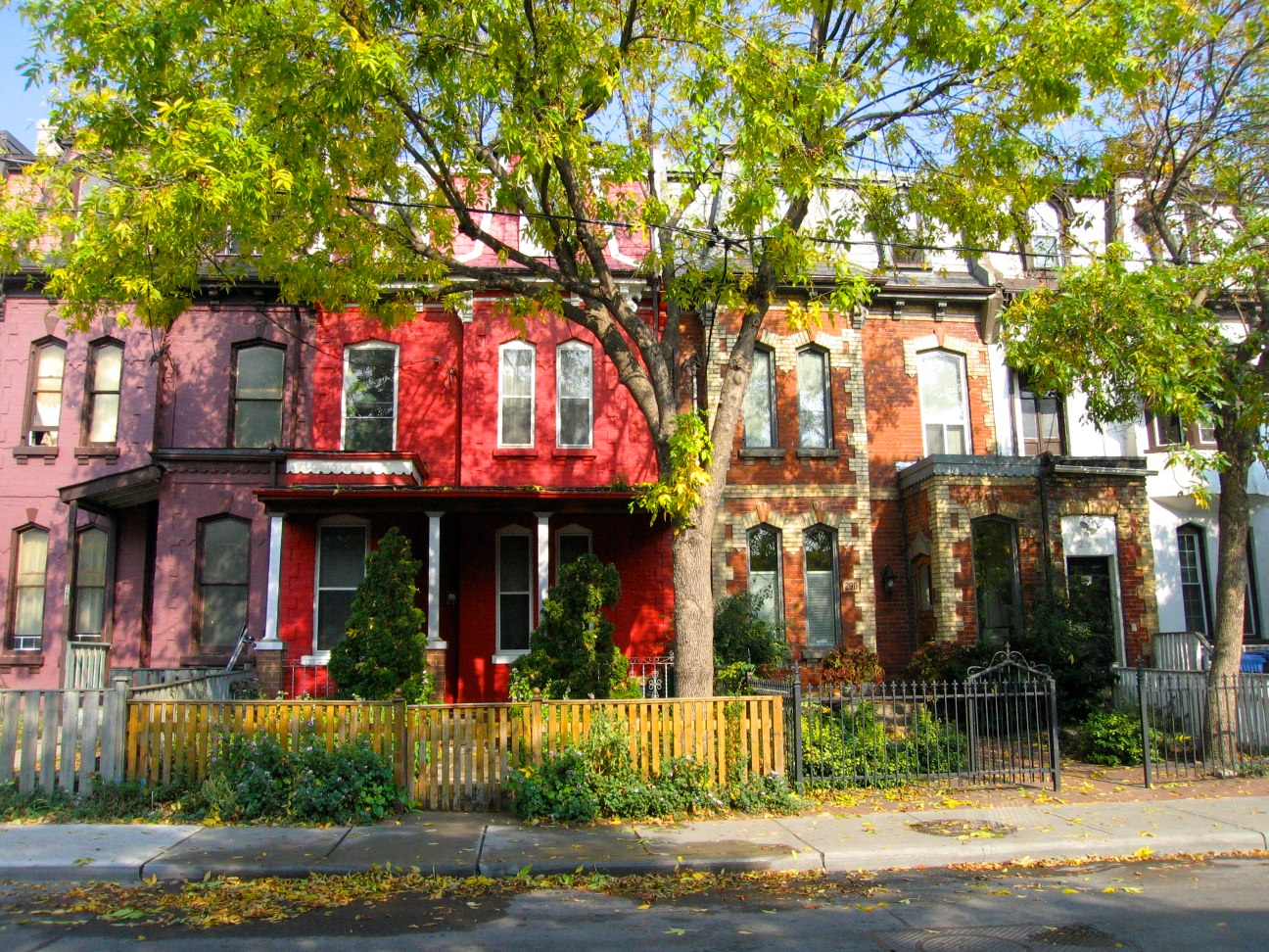 Visite à Totonto en octobre 2007